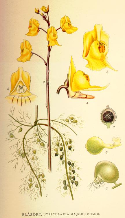 Utricularia australis